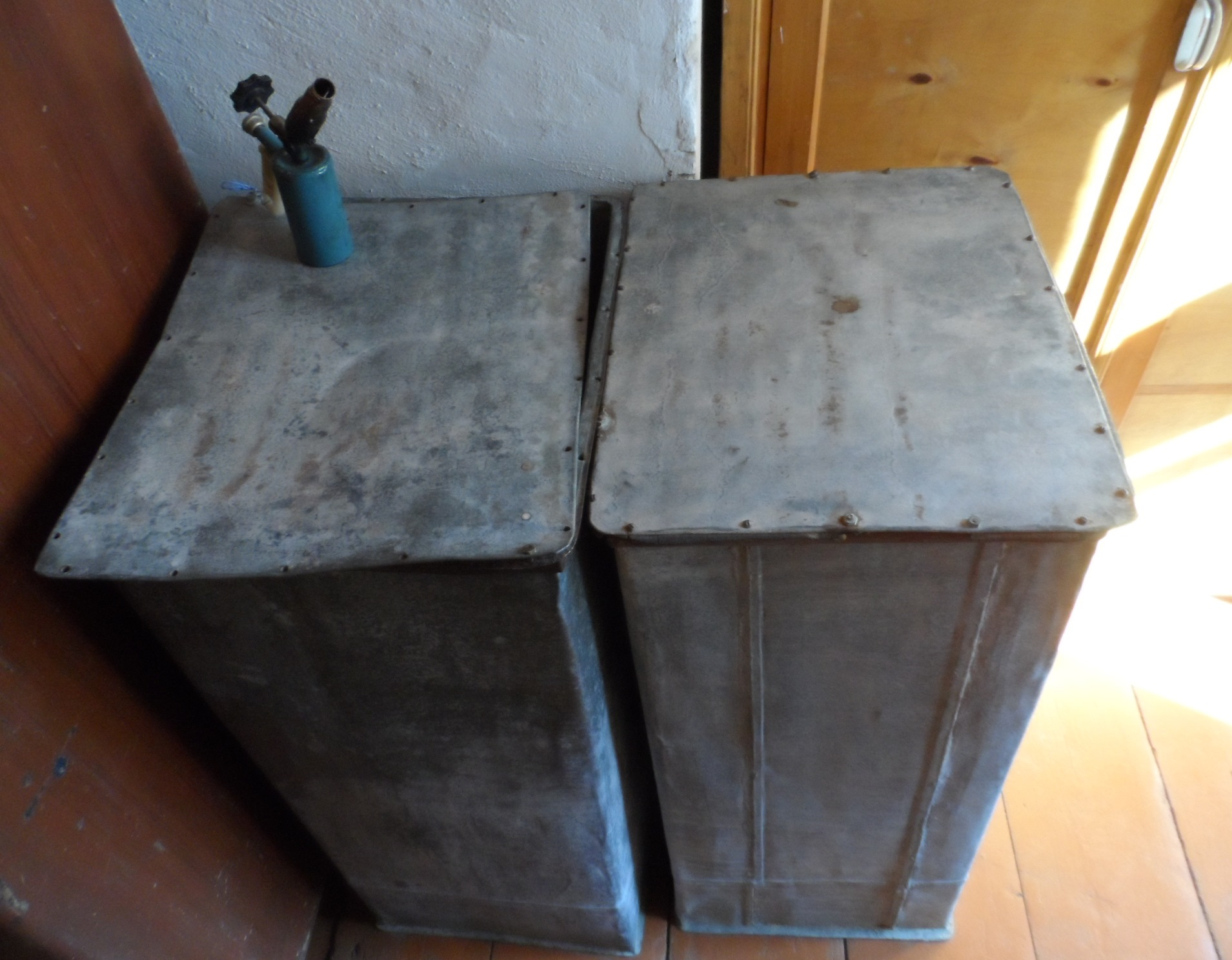 Фото оцинкованных ящиков, предназначенных для сохранения в земле рукописей дневников М. М. Пришвина, заказанных на случай угрозы их изъятия. Находятся в экспозиции усадьбы писателя в Дунино в окрестностях Звенигорода.